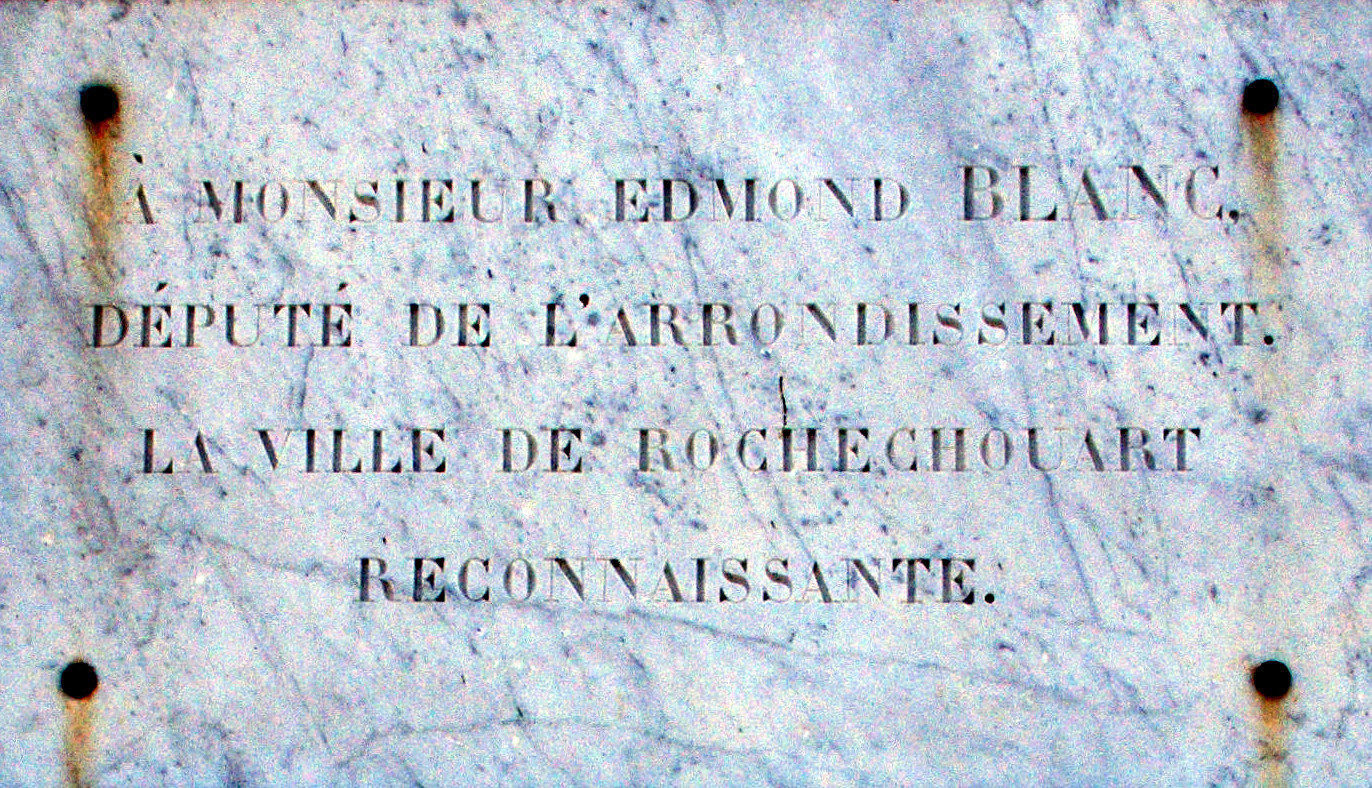 Rochechouart. Détail de la fontaine à Edmond Blanc, député au 19e siècle. Insription:A Monsieur Edmond Blanc député de l'arrondissement. La ville de Rochechouart reconnaissante.